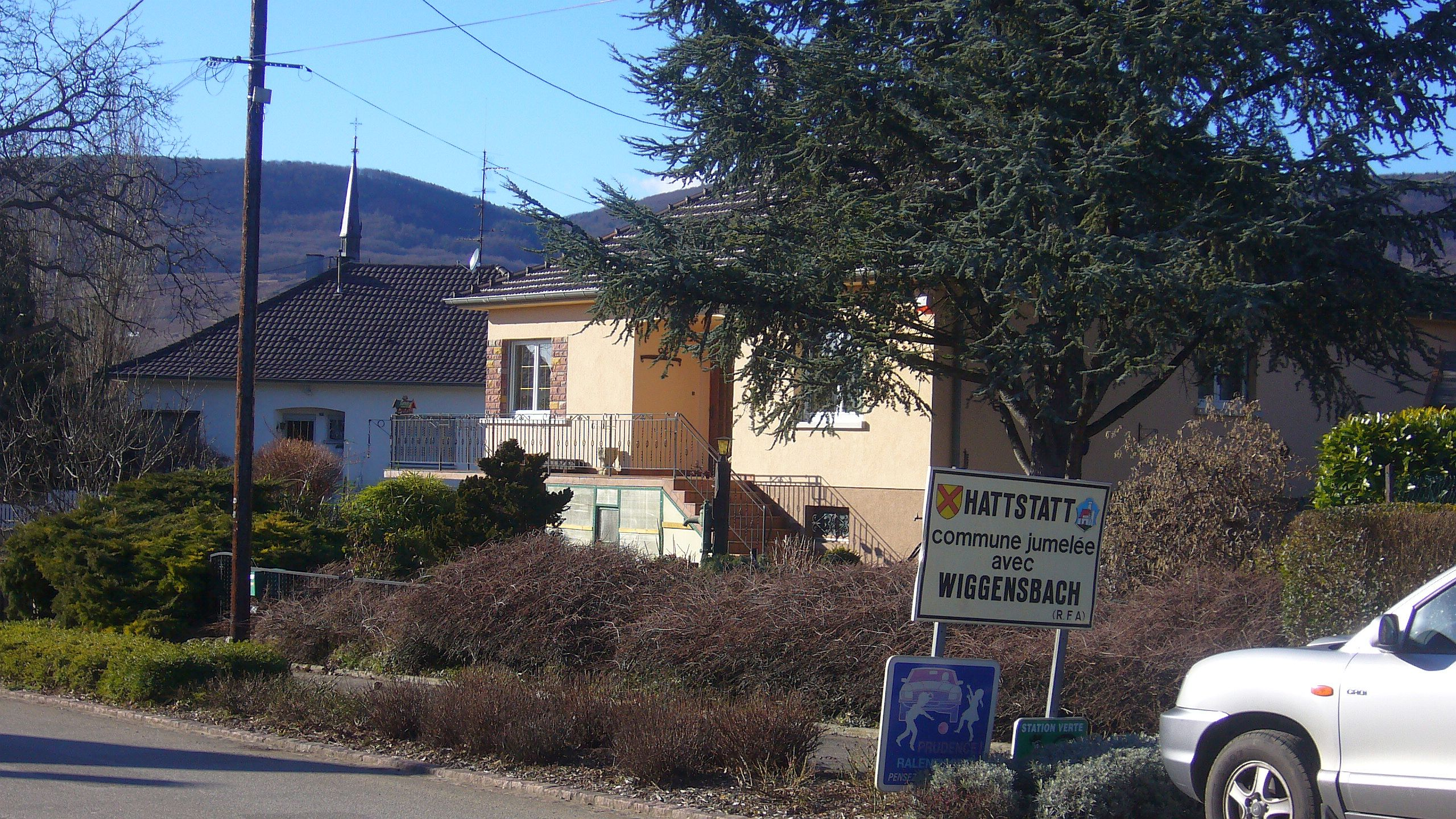 L'entrée du village d'Hattstatt dans le Haut-Rhin